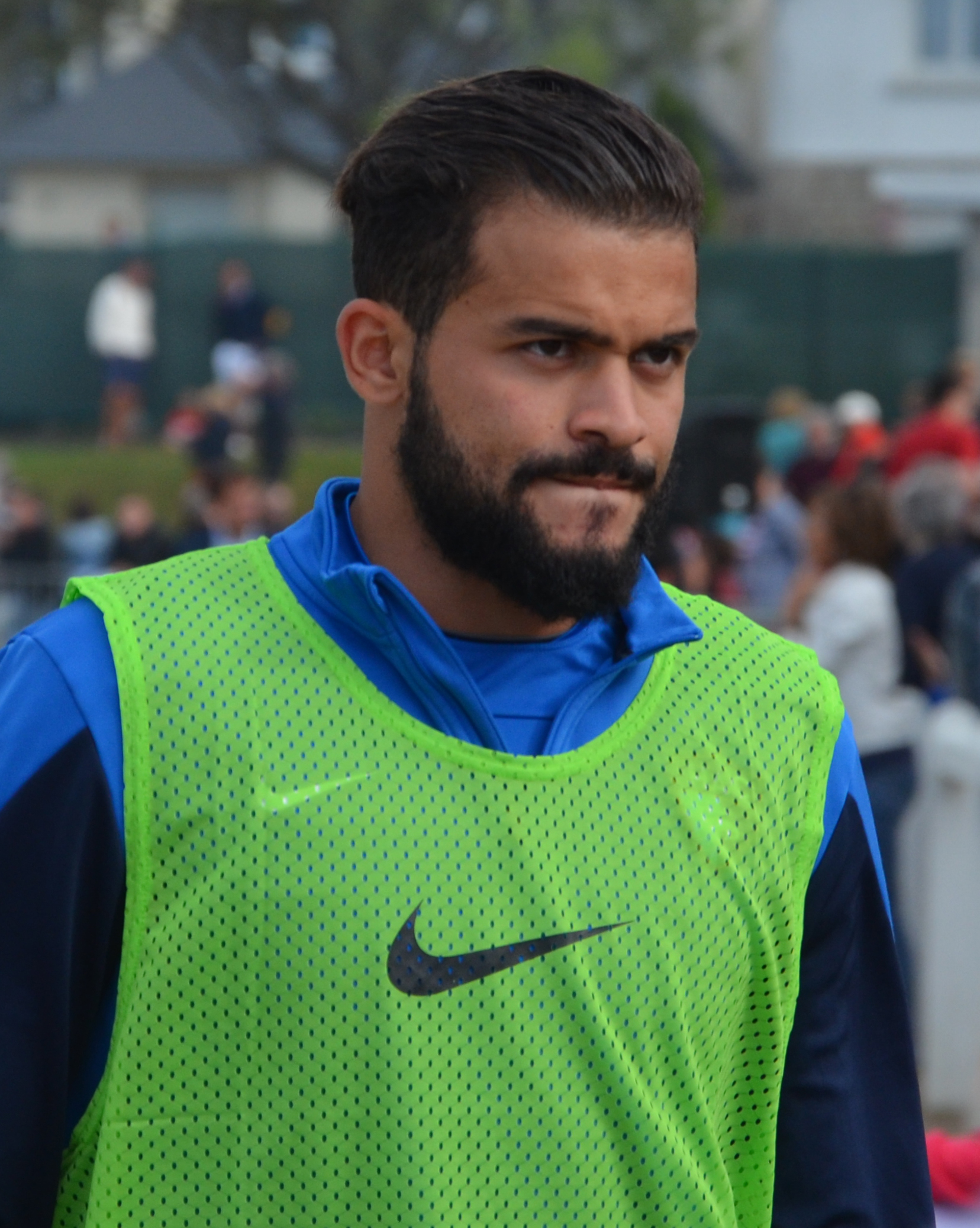 Photographie prise lors du match opposant le Stade rennais au Havre AC en amical au stade Paul-Audrin de Dinard le 8 juillet 2015. Ici, Khaled Ayari, mis à l'essai par Le Havre.